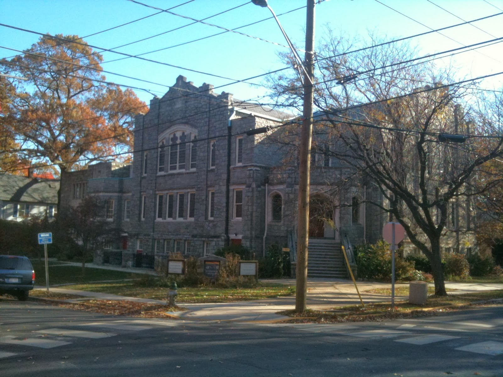 Takoma Park Presbyterian Church in Takoma Park, Maryland (310 Tulip Ave)